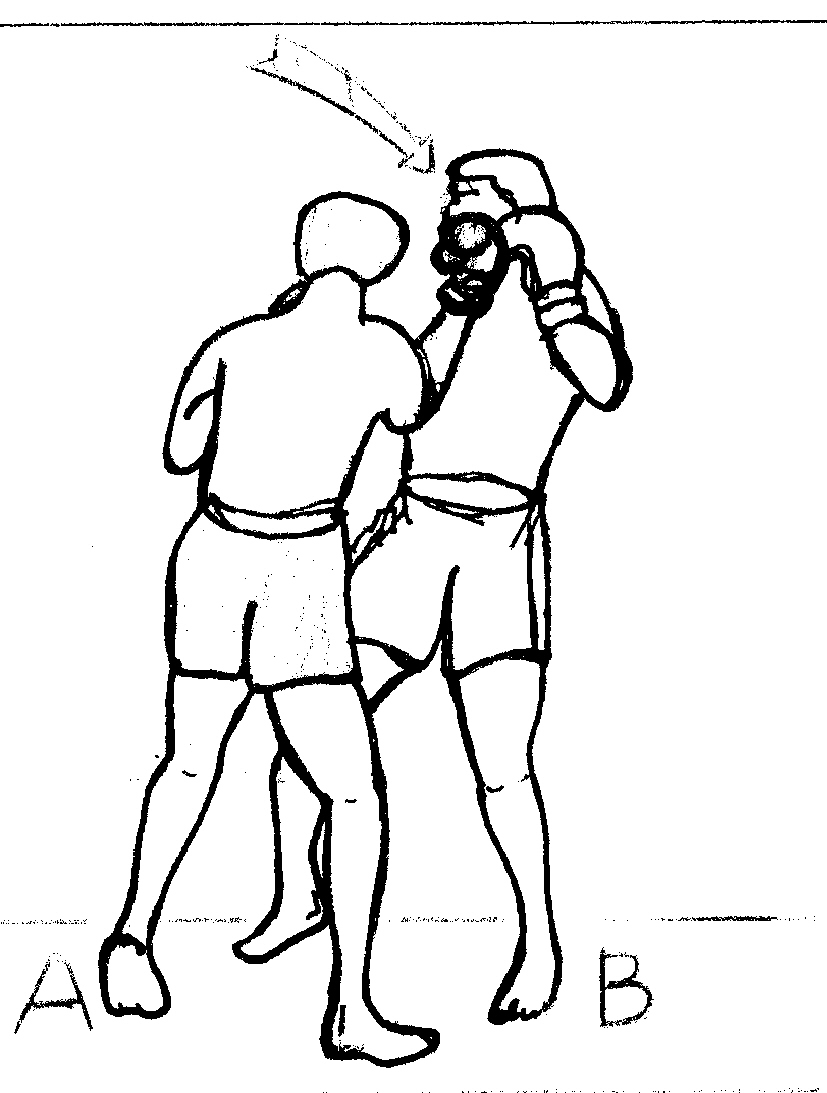 uppercut7.jpg